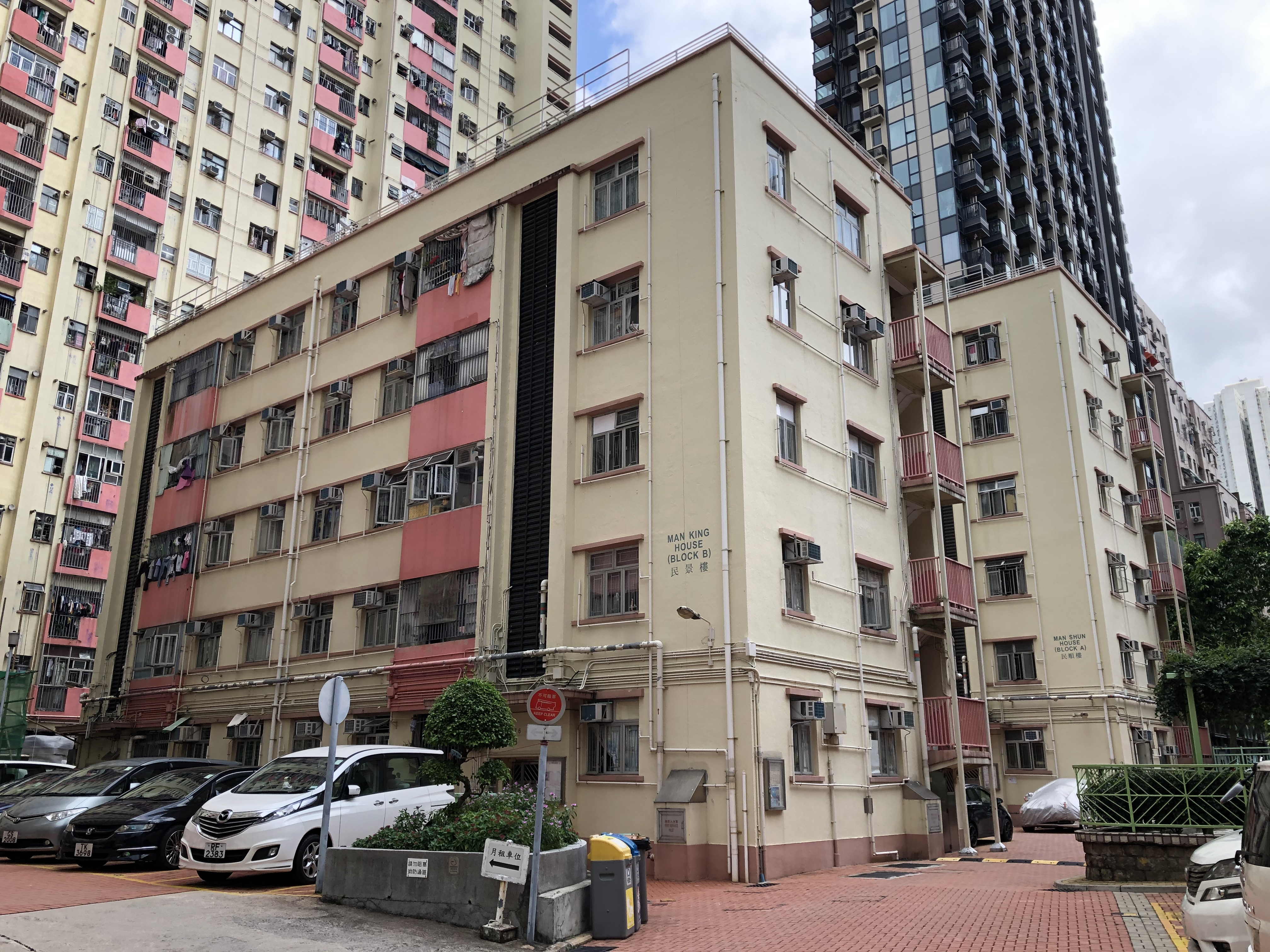 中文（香港）: 鰂魚涌模範邨A座及B座，是全香港首兩個落成的公屋大廈，現時各被拆剩半座。